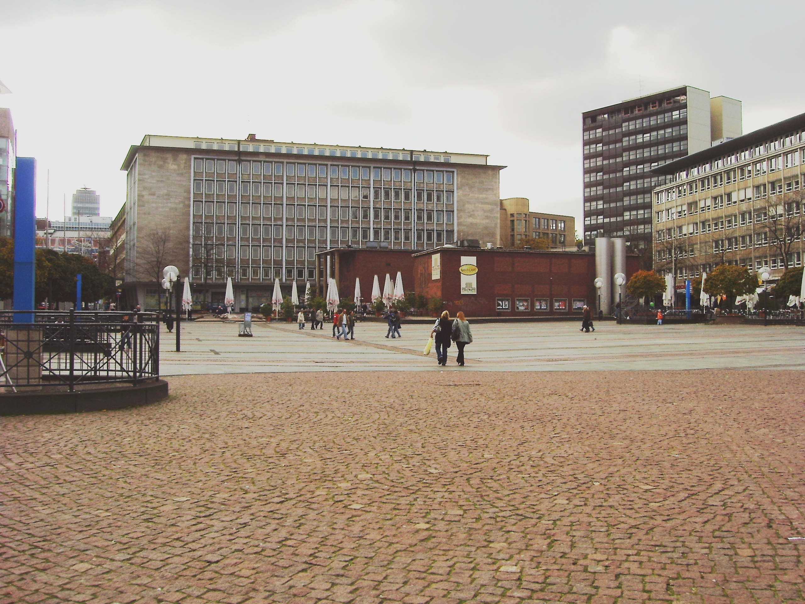 Stratmanns Theater, Kleinkunstbühne Dr. Ludger Stratmann, Europahaus, Kennedyplatz